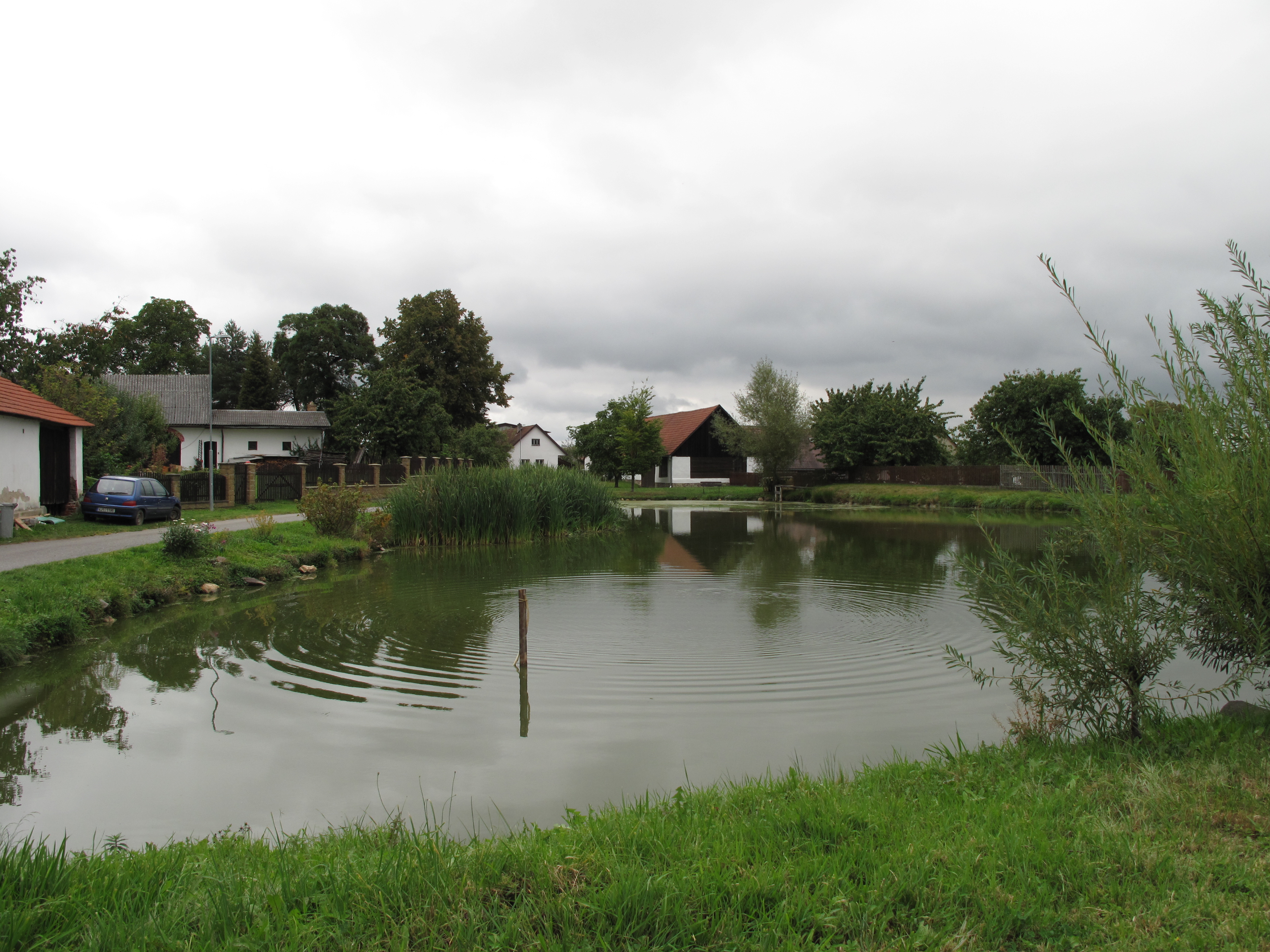 Jezírko v Babicích. Okres Pelhřimov, Česká republika.